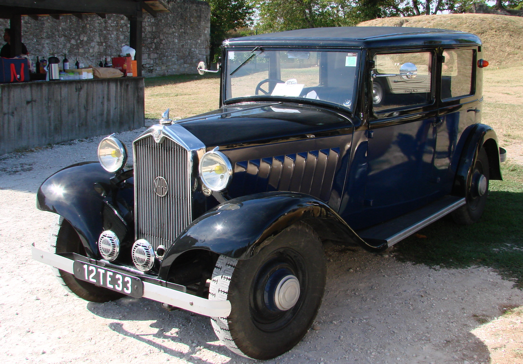 Mathys Emy 4 S de 1933 (journées du patrimoine 2012 Blaye)